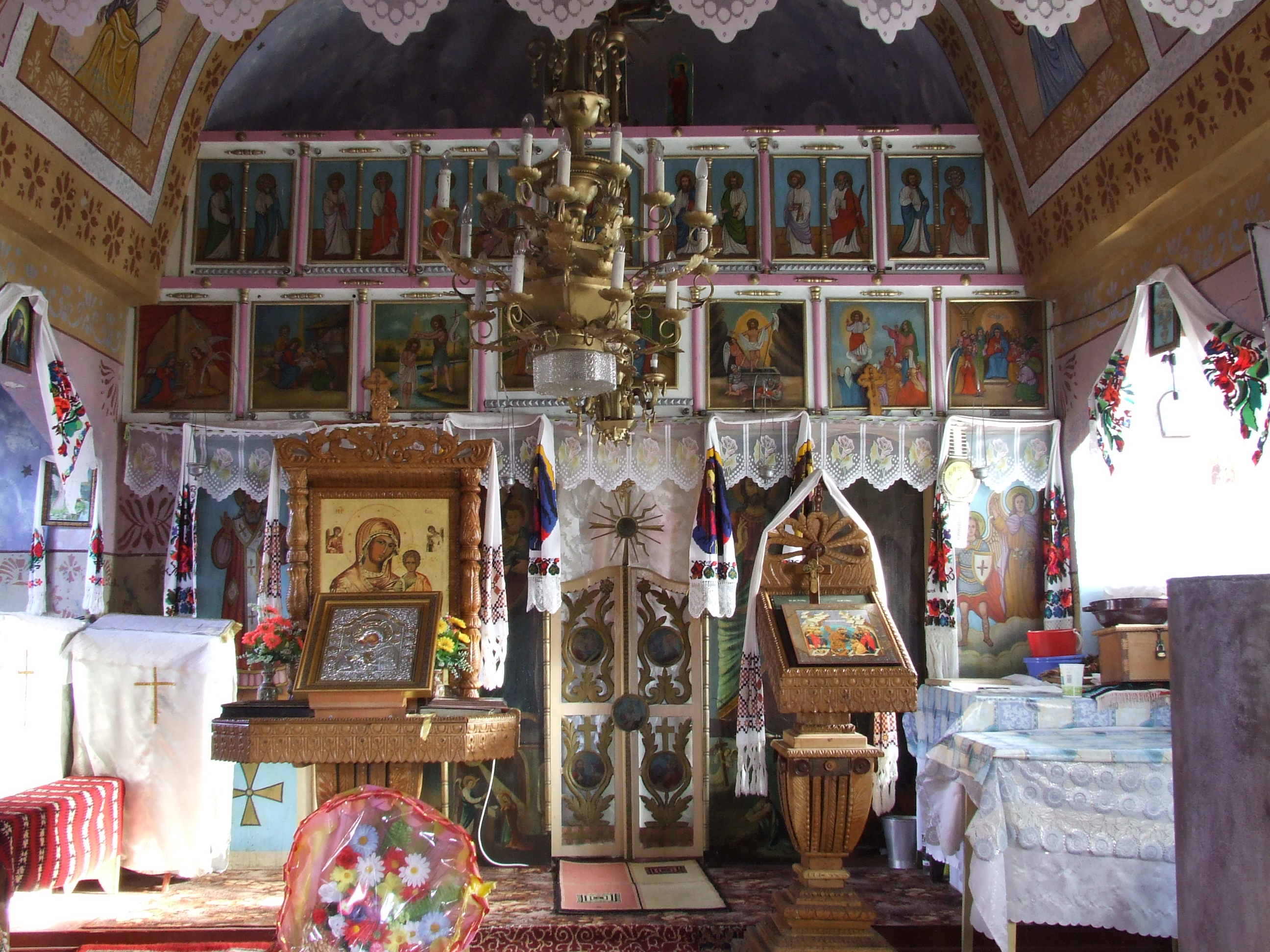 Biserica de lemn din Leurda, judeţul Cluj.